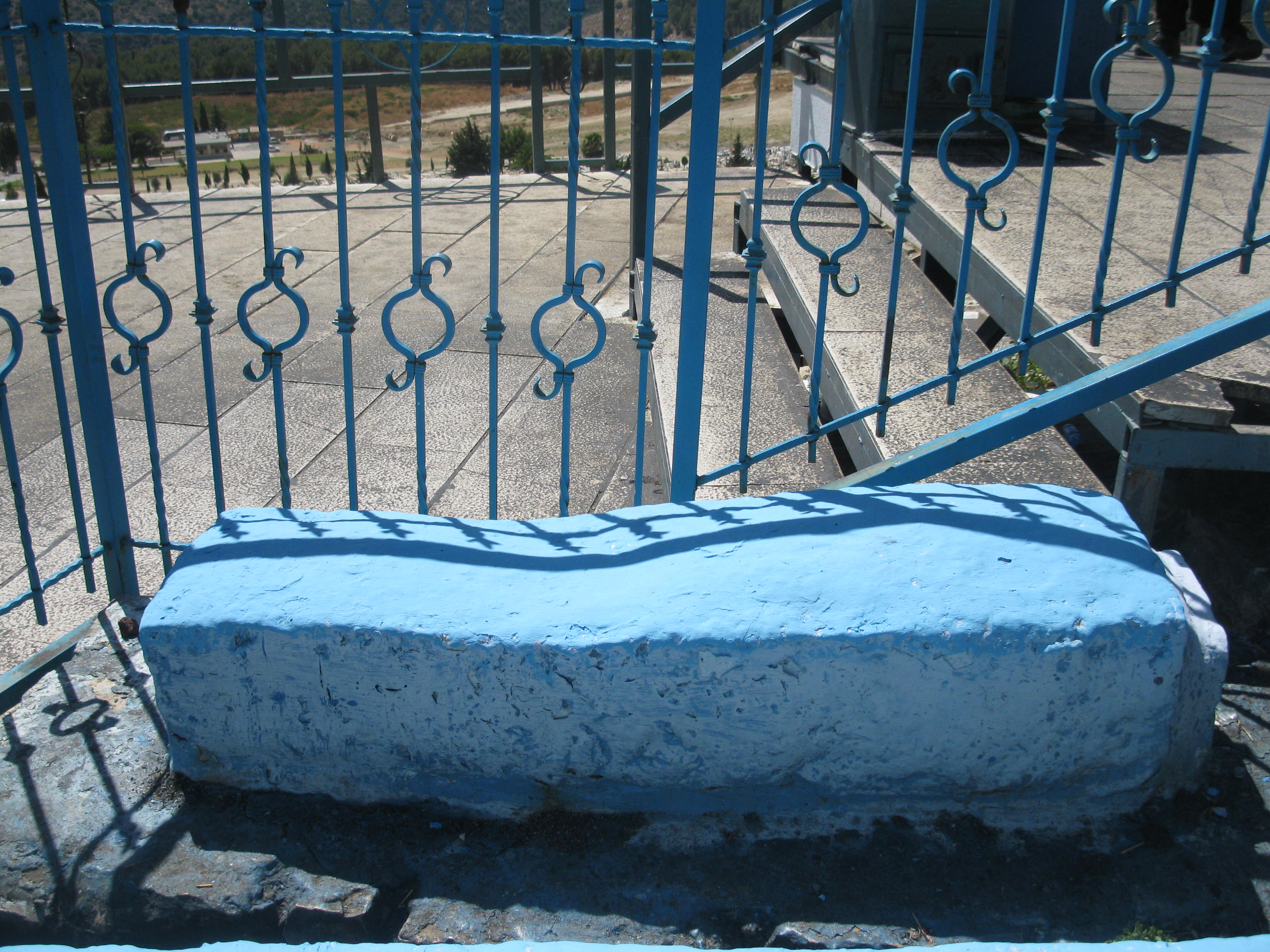 קברו של רבי אלעזר אזכרי סמוך להאריז"ל בבית העלמין העתיק בצפת.